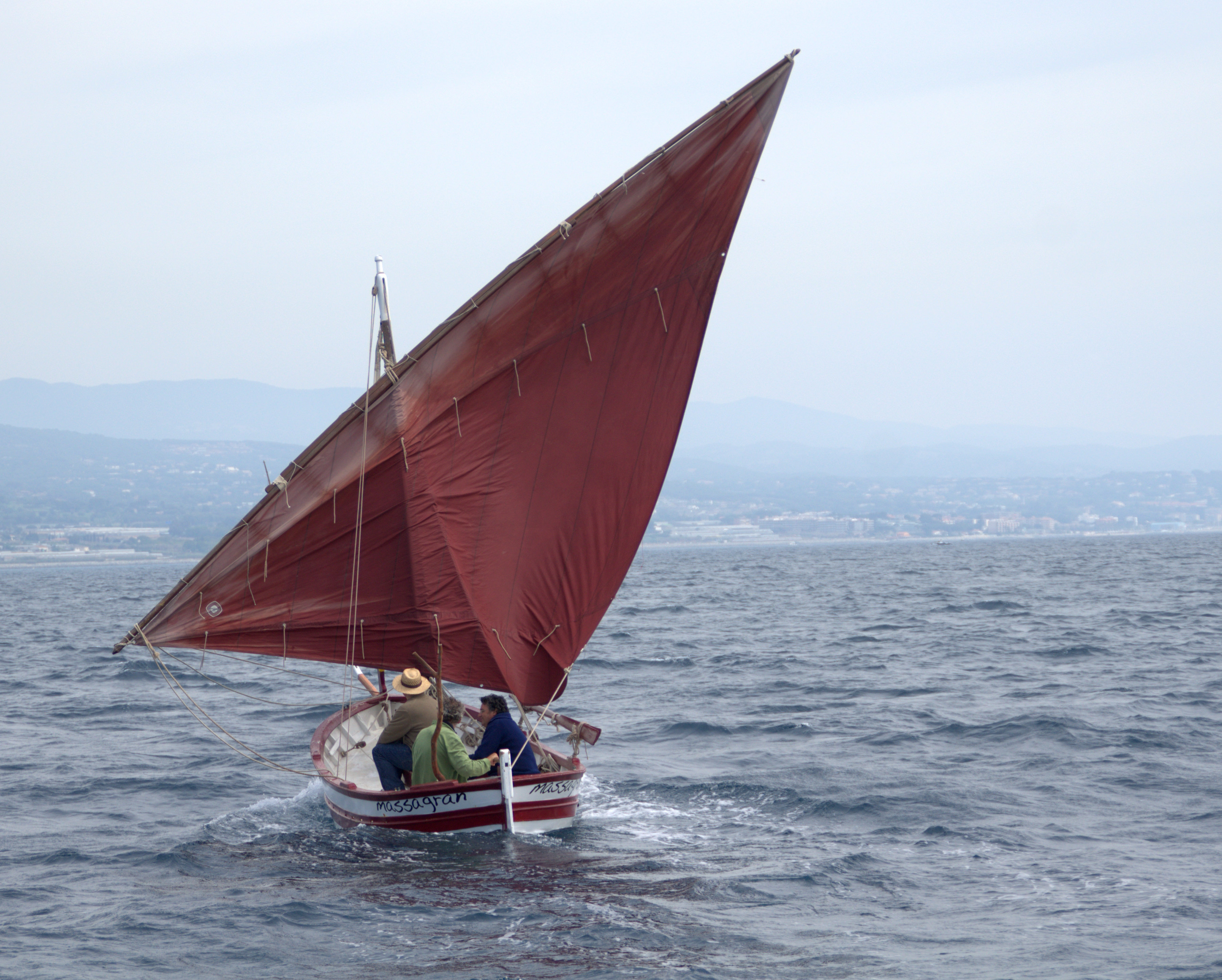 Popa del Massagran. Llaüt de vela llatina.